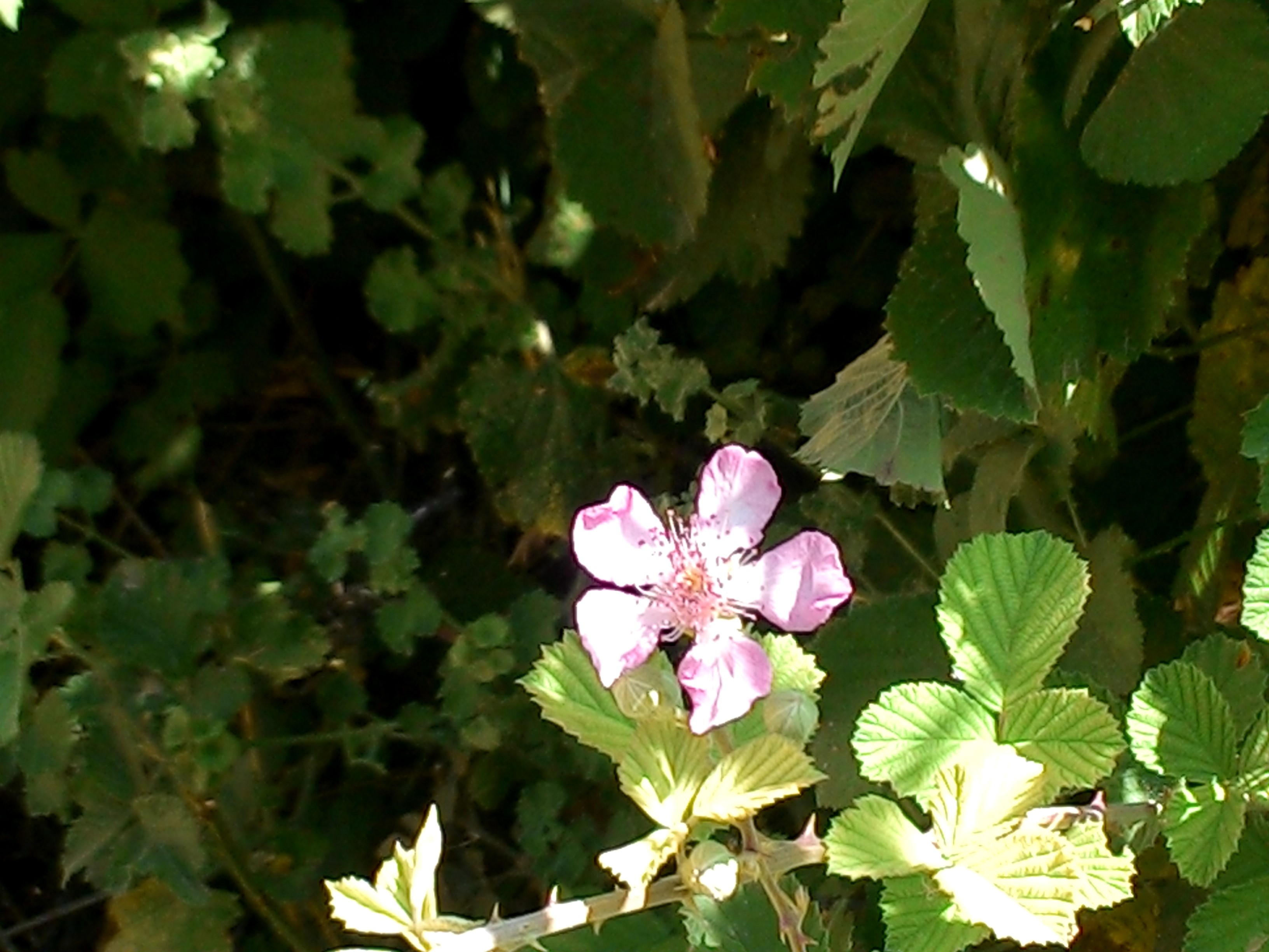 פטל קדוש-צילם מתן ממן